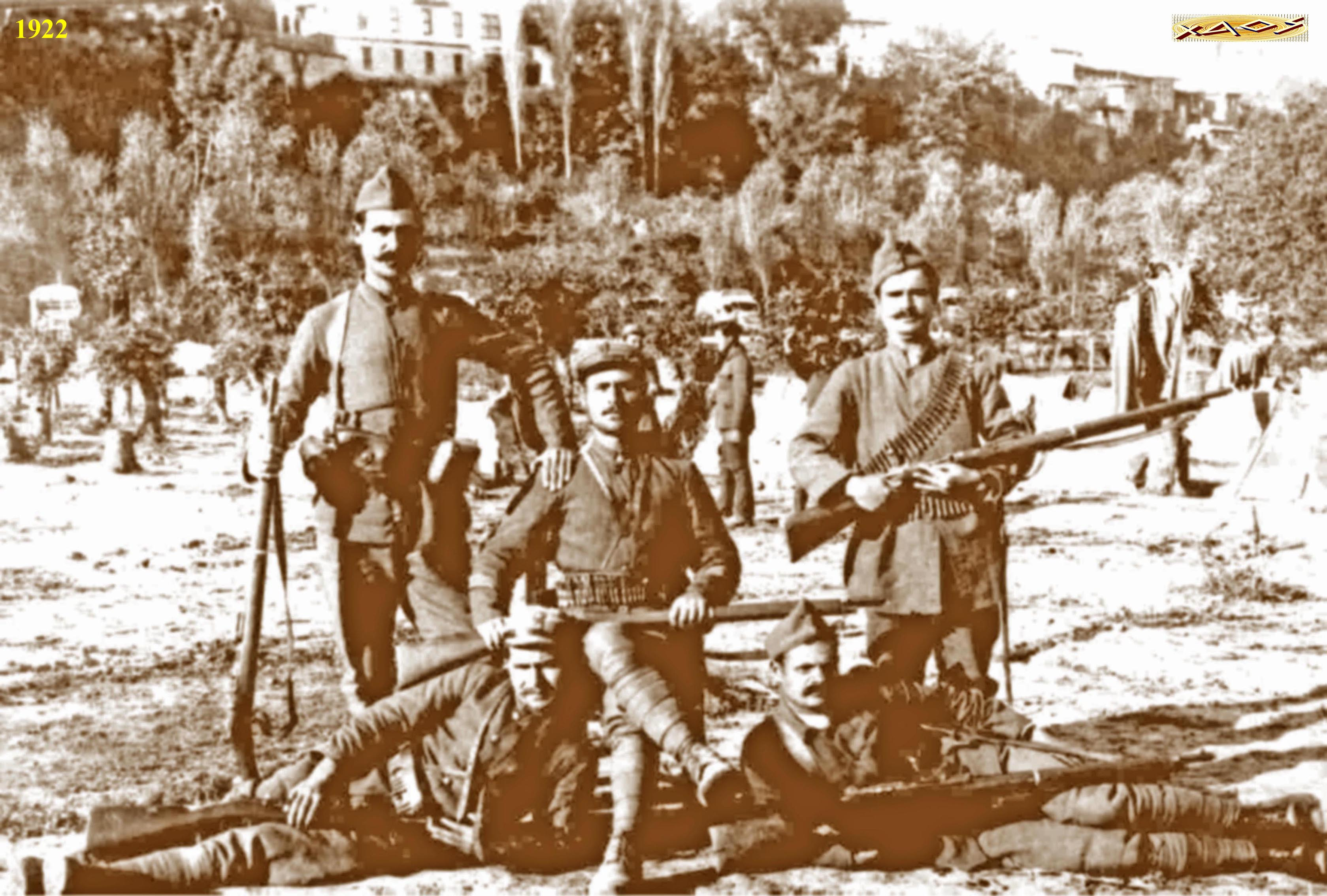 Έλληνες στρατιώτες στην Εκστρατεία της Μικράς Ασίας.